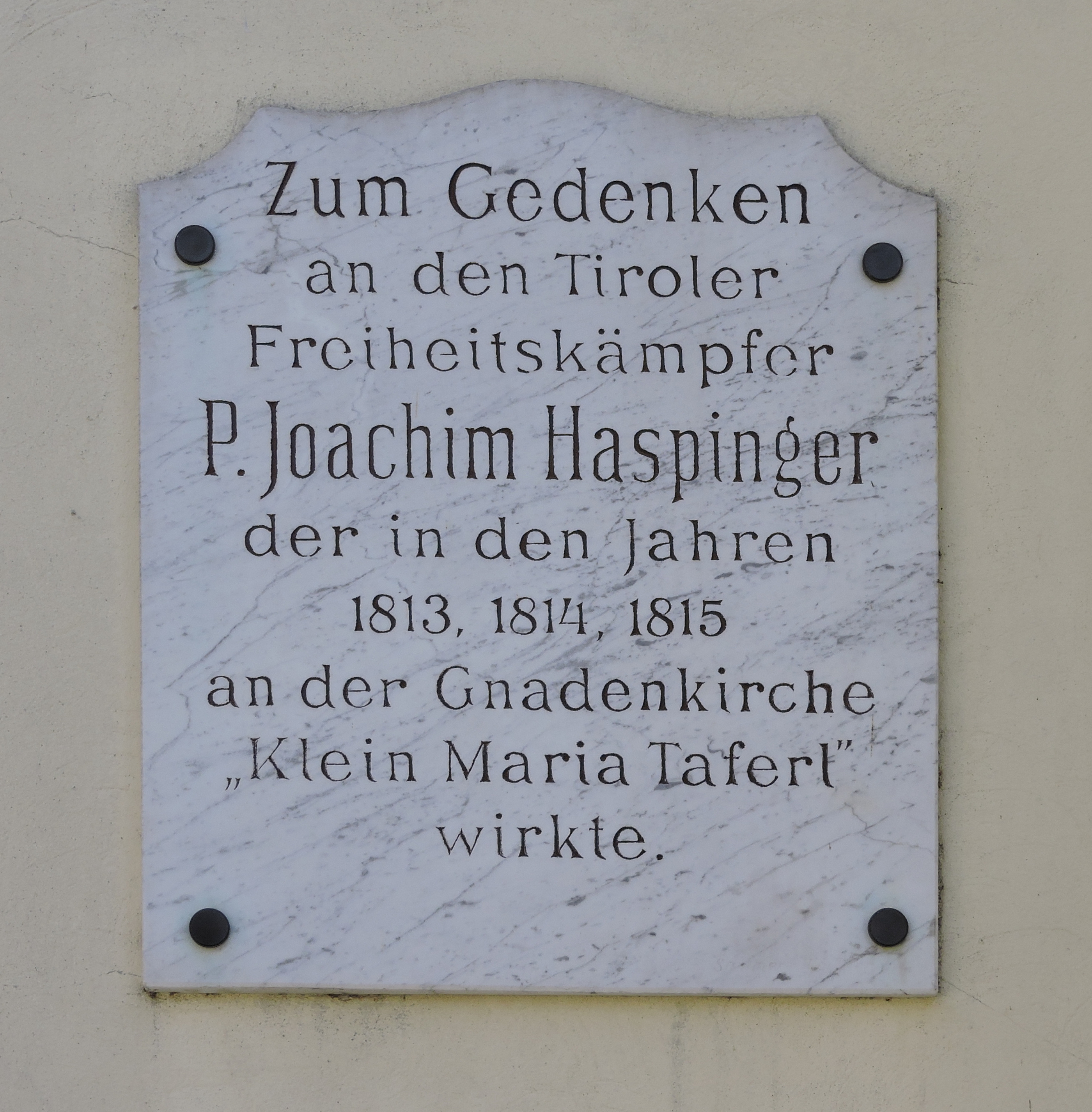 Gedenktafel für Pater Joachim Haspinger an der Außenfassade der Pfarrkirche Groß-Jedlersdorf